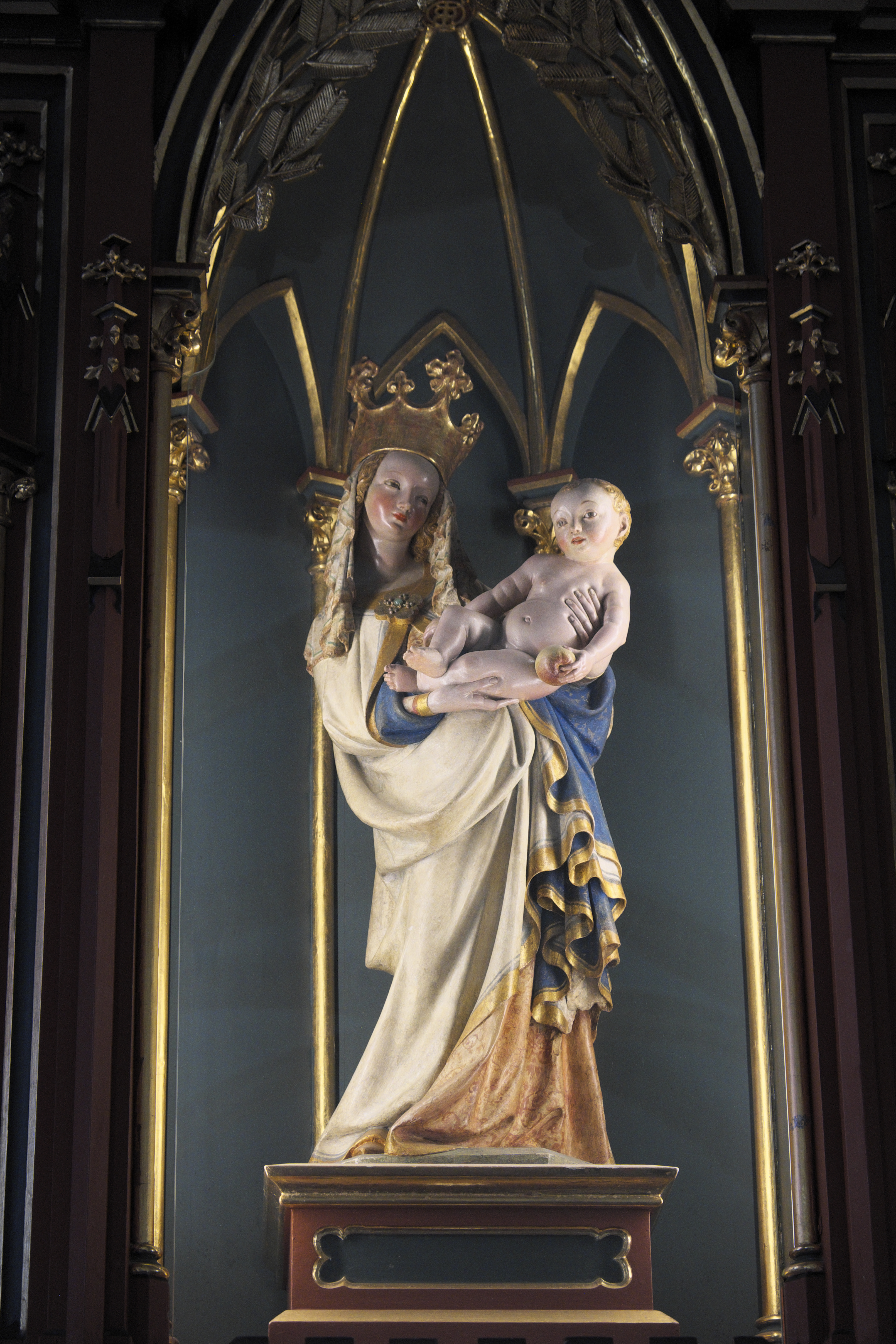 Katholische Pfarrkirche Unserer Lieben Frau Geburt in Altenmarkt im Pongau im Bundesland Salzburg (Österreich)